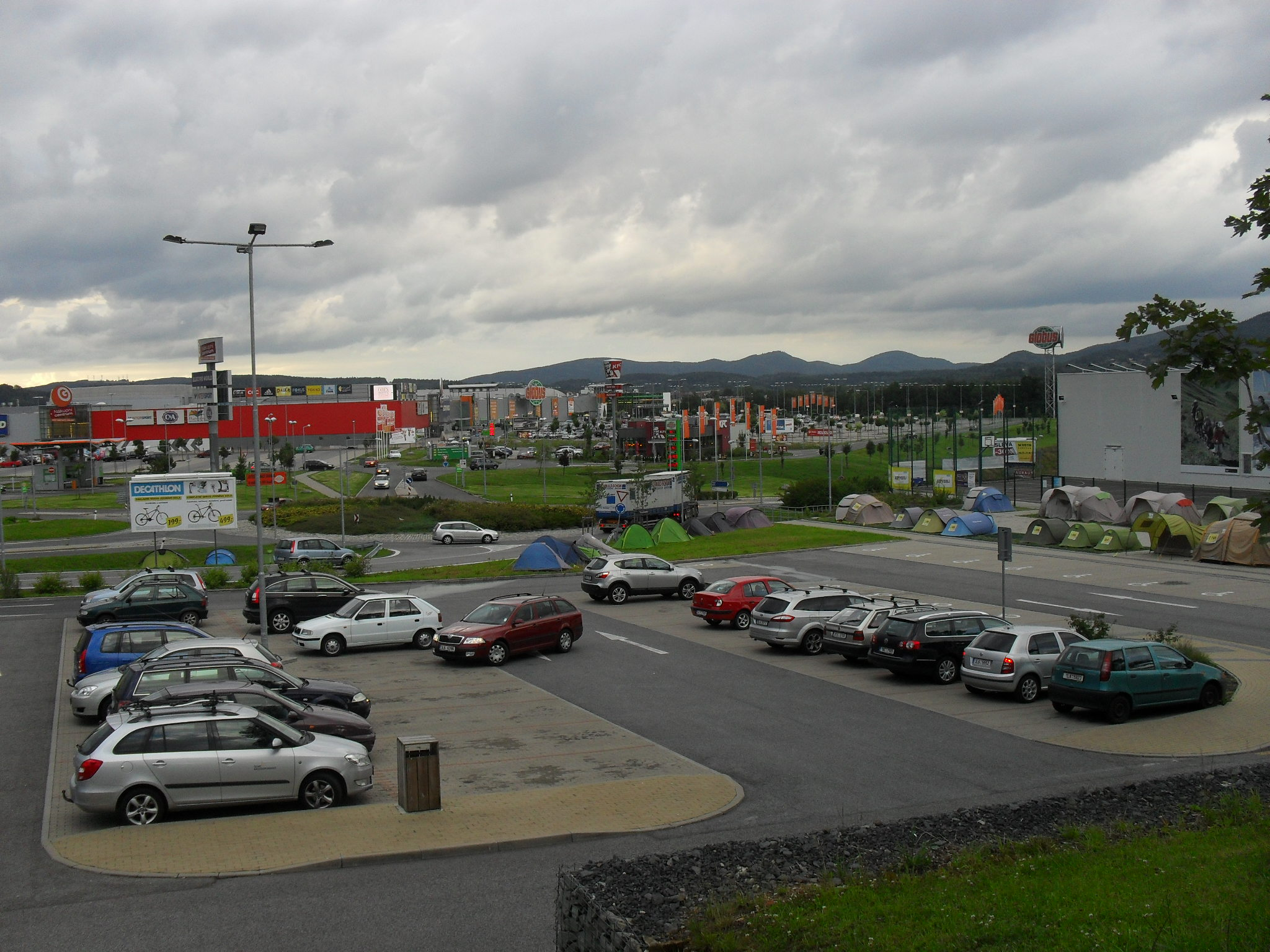 Pohled na obchodní zónu Sever v libereckém Růžodole I.